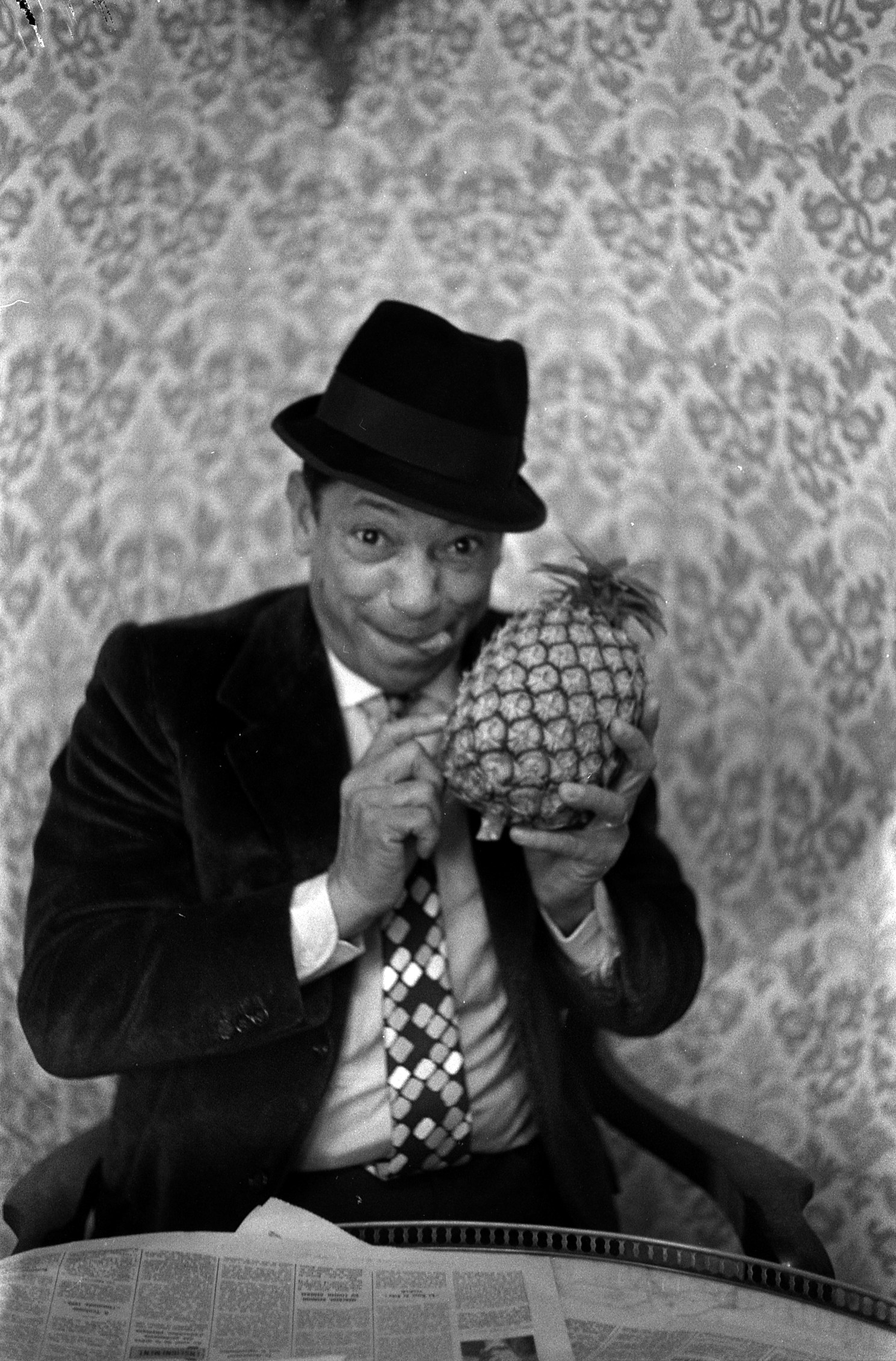 intérieur d'un appartement (ou hôtel) Toulousain. Le 17 mars 1970. Plan rapproché de face de l'acteur/chanteur Henri Salvador, tenant entre ses mains un ananas et tirant la langue en direction du photographe, lors d'une interview pour la sortie de son film "Et que çà saute!". Observation: De passage à Toulouse,Henri Salvador présente son film en grande première avant Paris, "et que çà saute!". L'ananas qu'il tient entre ses mains, représente sur l'affiche du film, une bombe. D'ou les images où Henri Salvador s'amuse avec ce fruit.